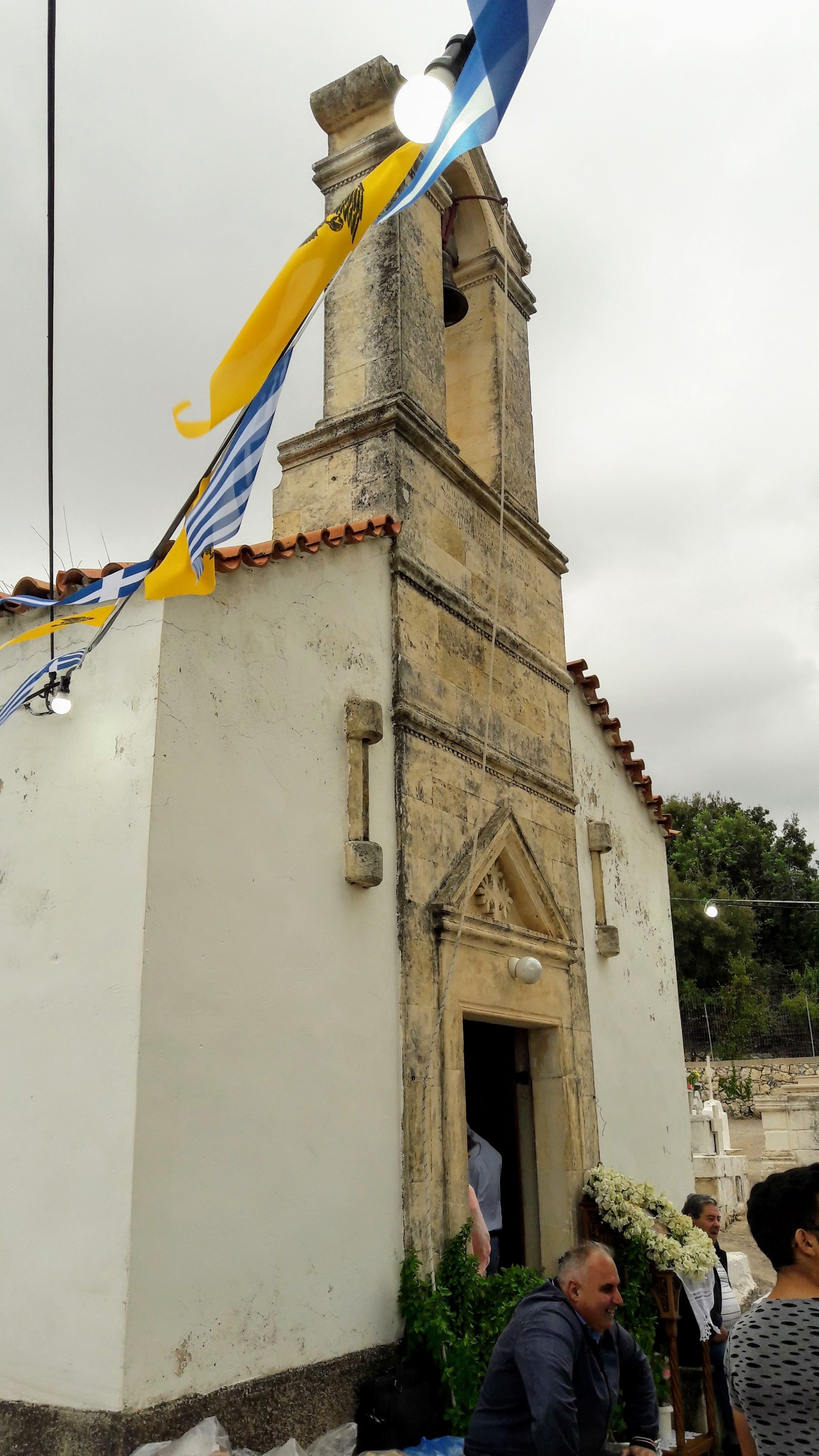 Ιερός Ναός Υψώσεως Τιμίου Σταυρού Καλανδαρέ